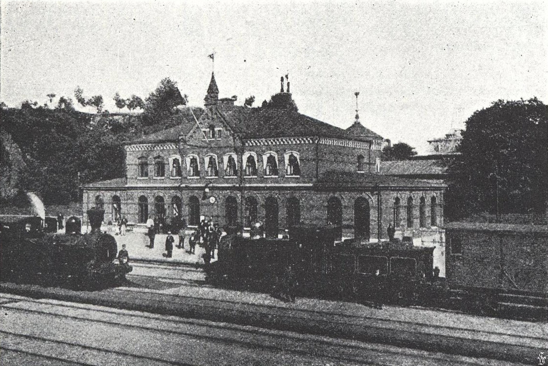 Borås nedre järnvägsstation